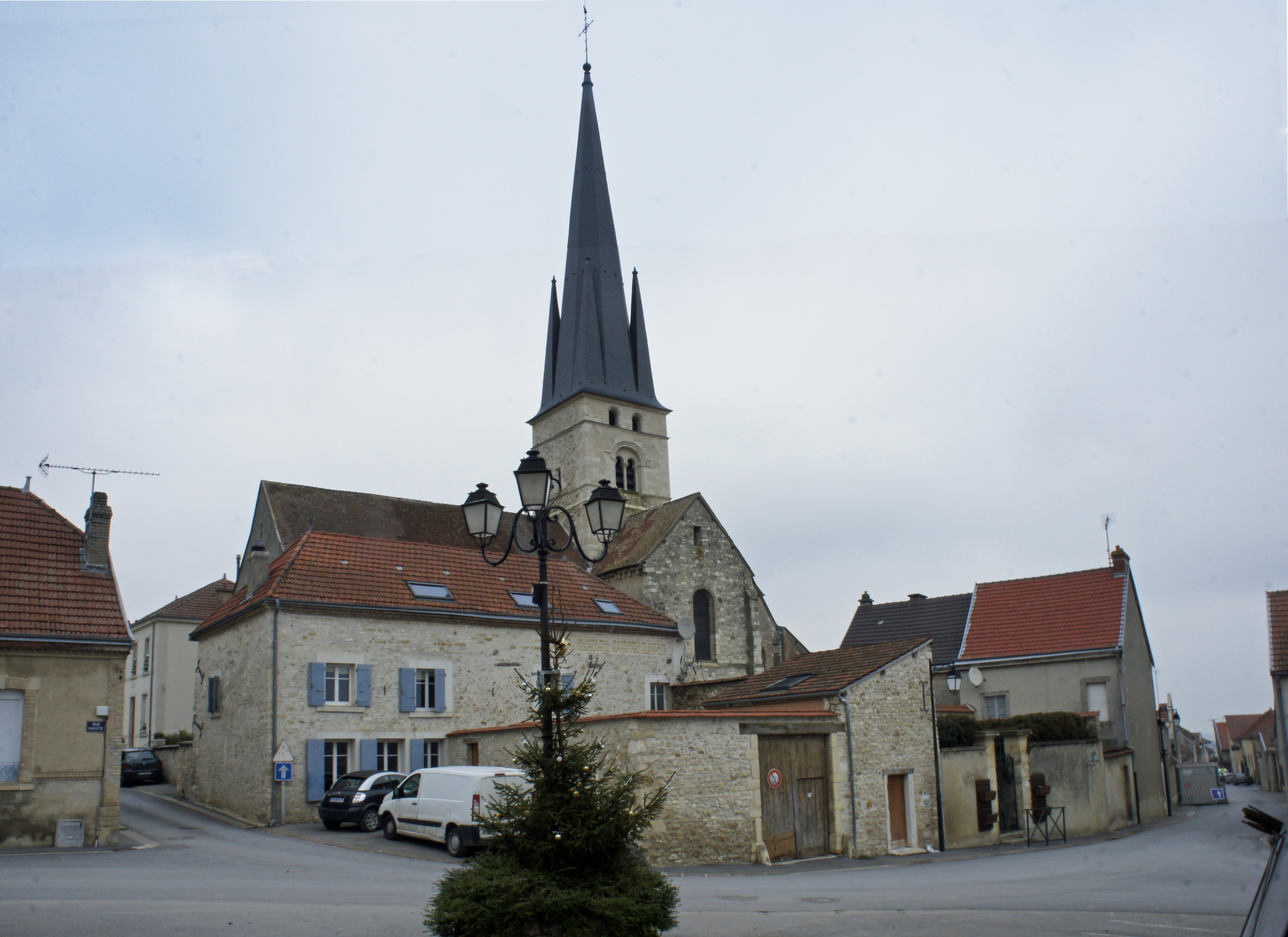 vue de l'Église Saint-Pierre-Saint-Paul de Chamery.